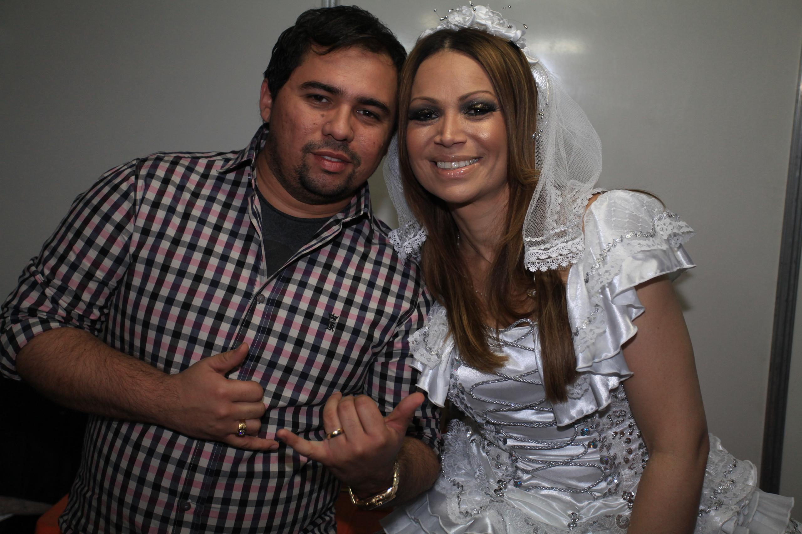 Solange Almeida e Xand Avião vocalistas da banda Aviões do Forró.